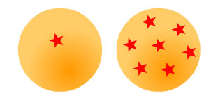 Balls